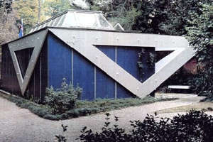 Padiglione ai Giardini della Biennale di Venezia progettato dall'architetto Alvar Aalto per la Finlandia